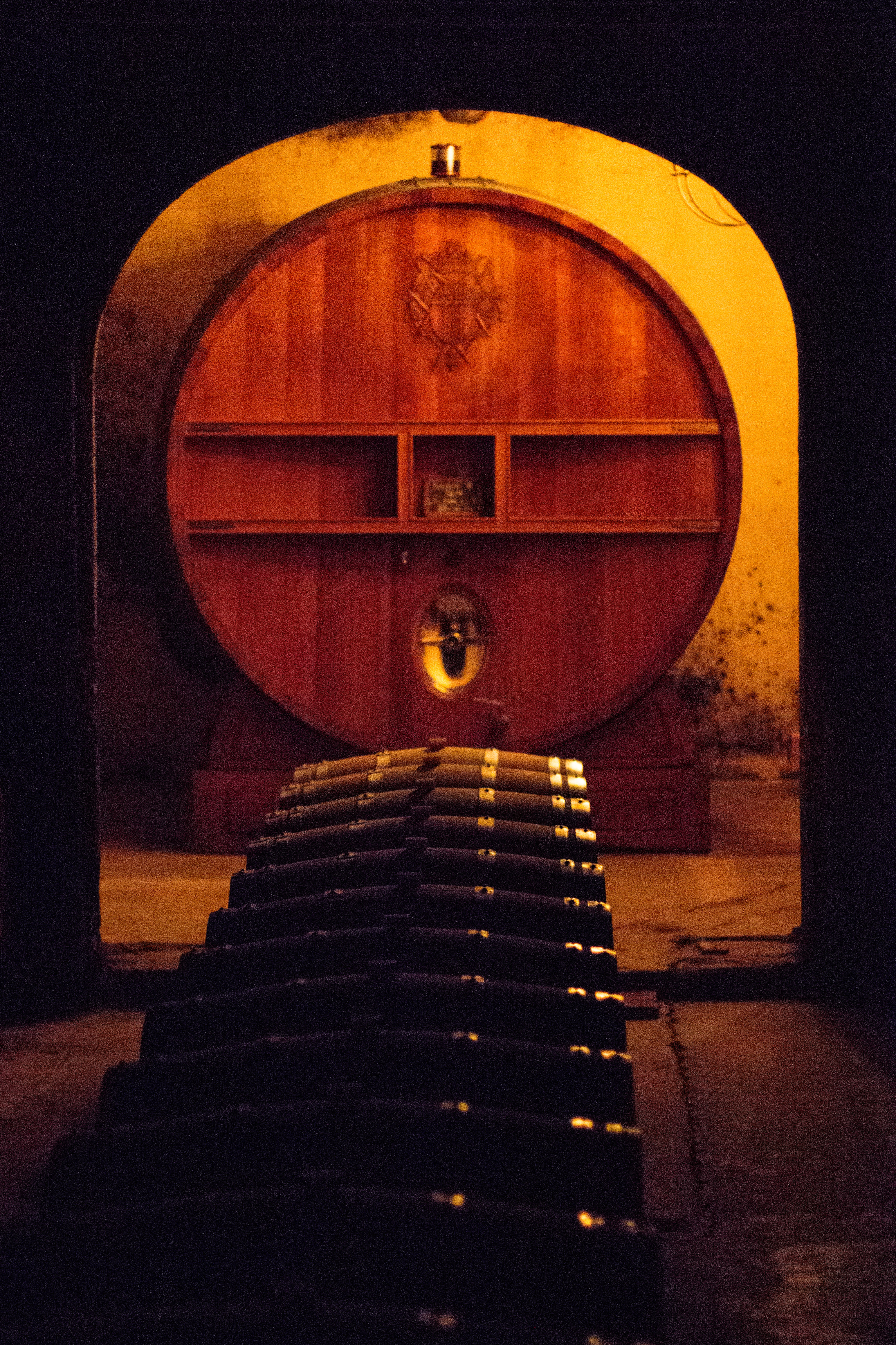 Foudre de 96 hL au Château La Nerthe, et rangée de fûts